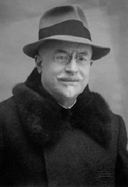 Santi Muratori